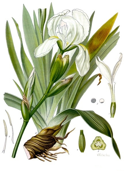 Florentiner Schwertlilie. A B Theile der Pflanze in natürl. Grösse; 1 Blüthe ohne Kronenabschnitte (Kronenröhre) im Längsschnitt, mit den blumenblattartigen Narben, desgl.; 2 Staubgefässe, vergrössert; 3 Pollen, desgl.; 4 Fruchtknoten, desgl.; 5 derselbe im Querschnitt, desgl.